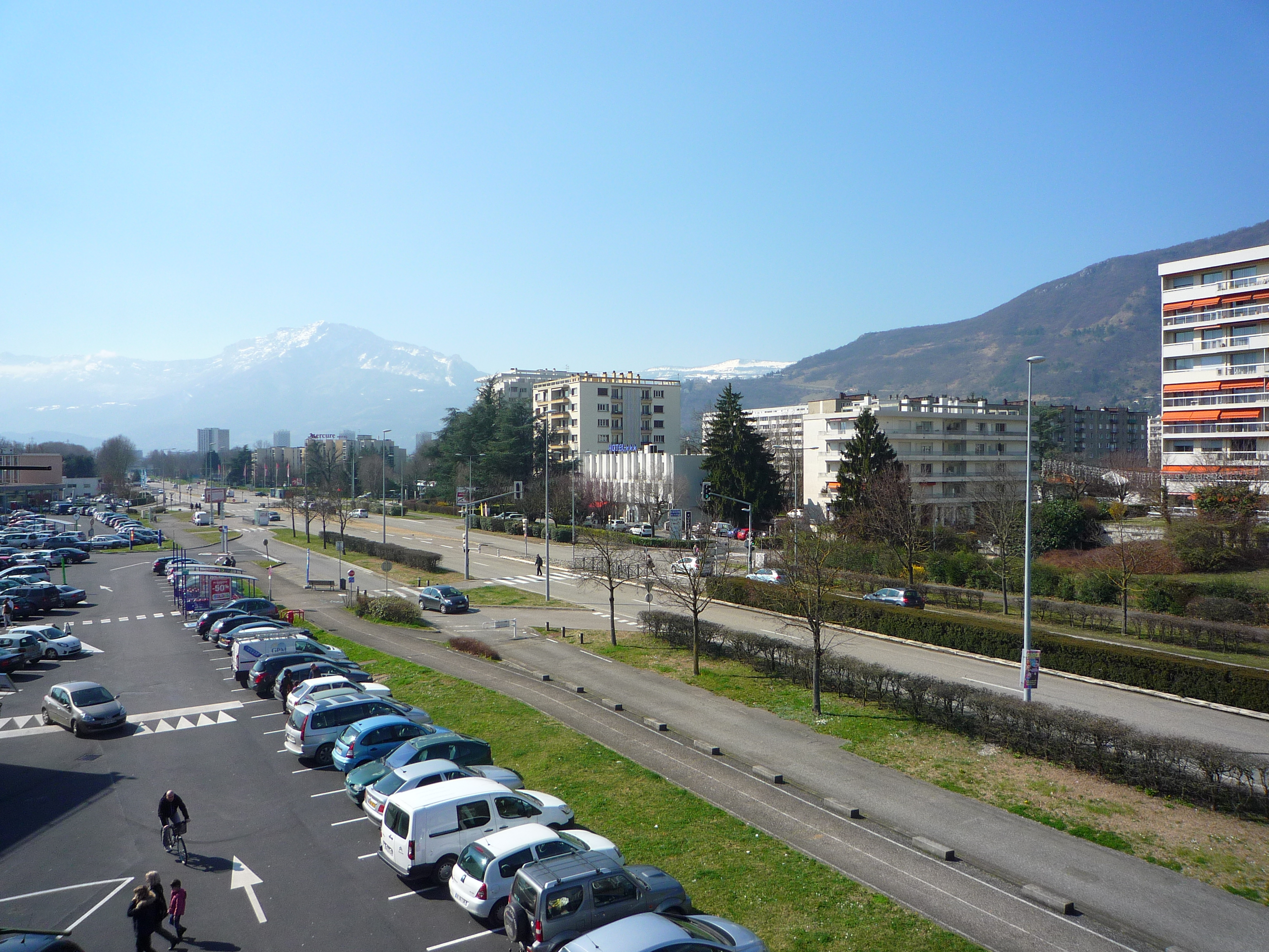 Avenue de Verdun - Meylan, Isère